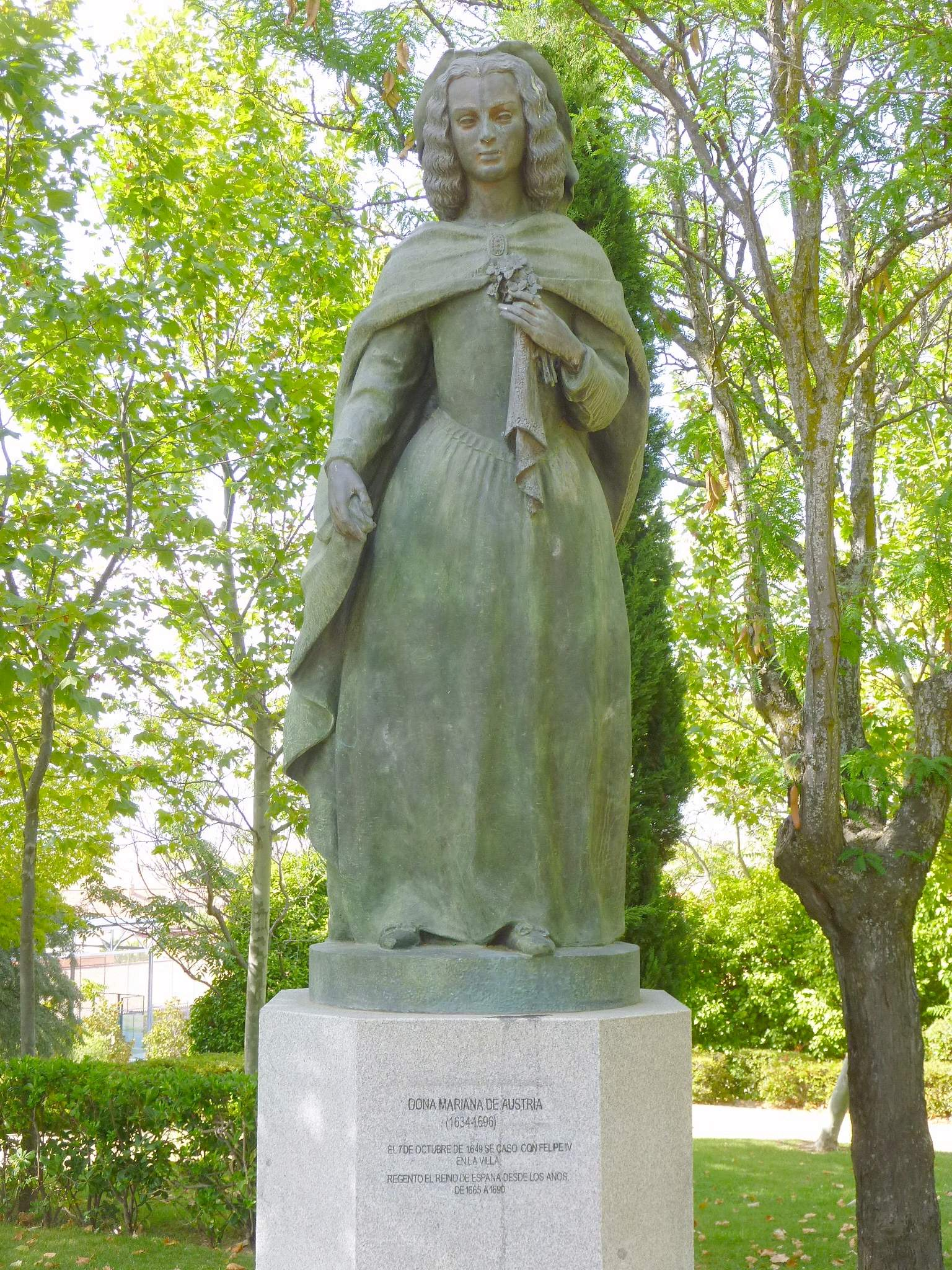 Parque Histórico de San Sebastián (Navalcarnero, Madrid)